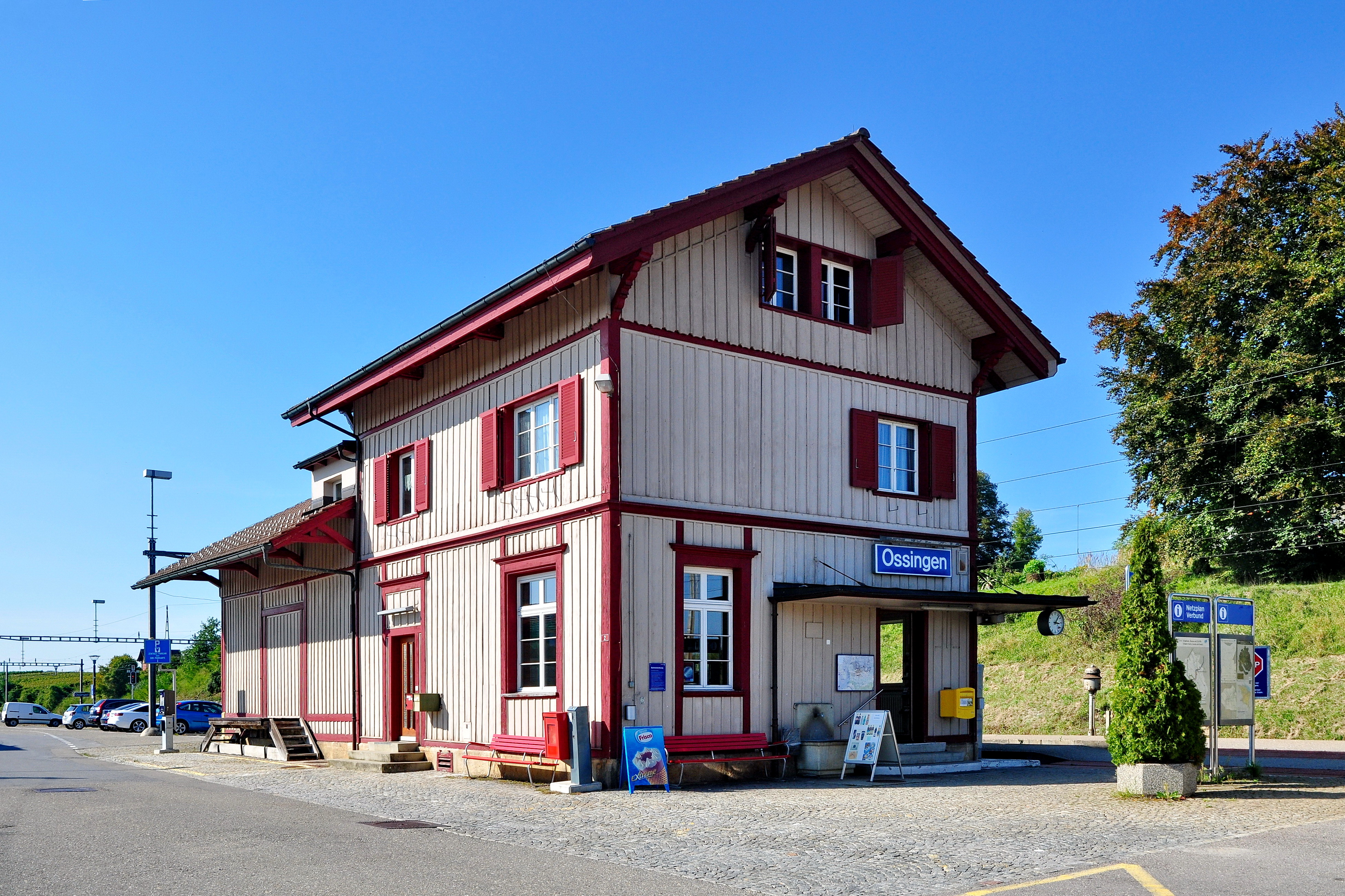 Bahnhof in Ossingen (Switzerland)